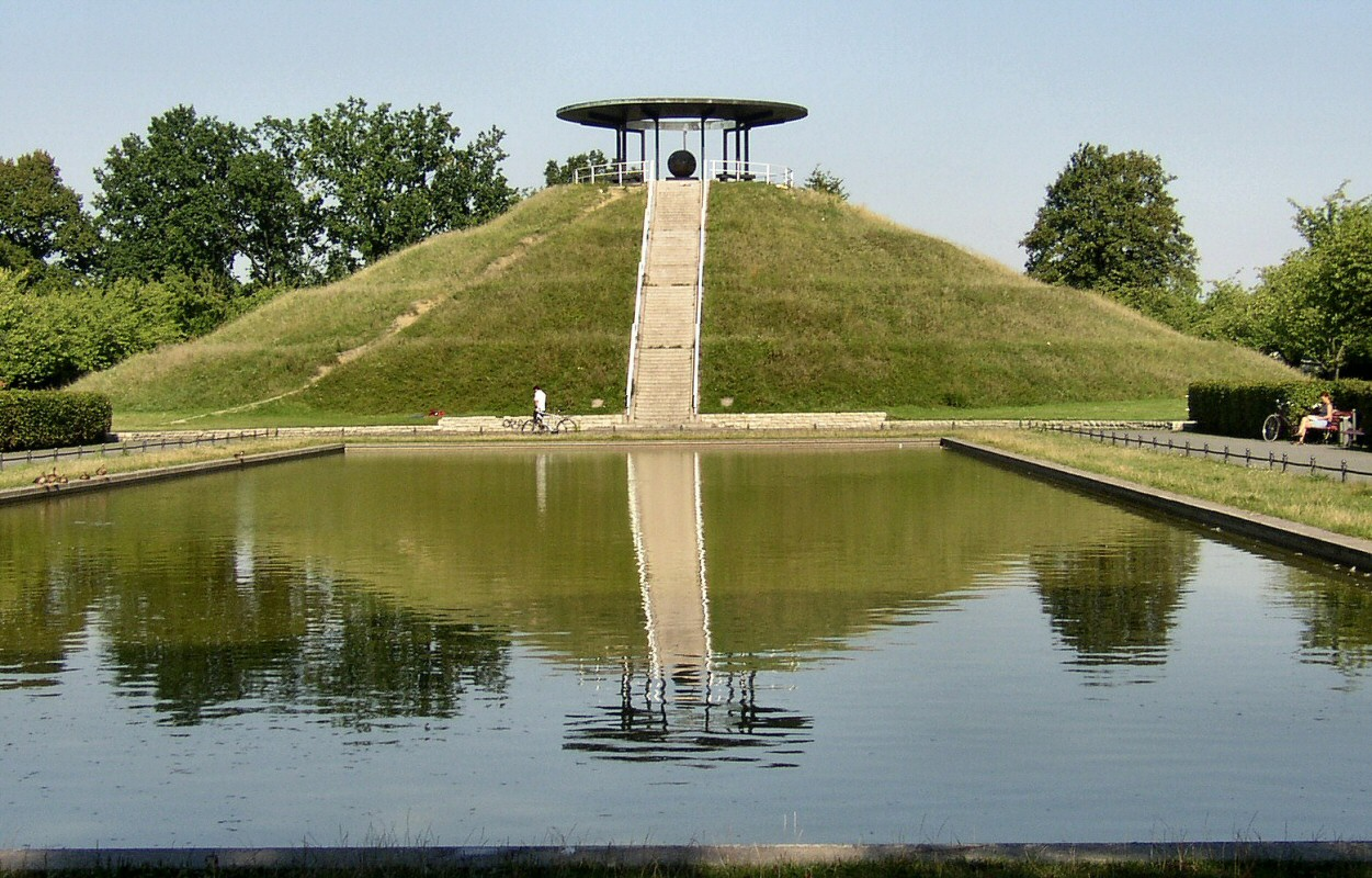 Lilienthal-Denkmal in Berlin-Steglitz